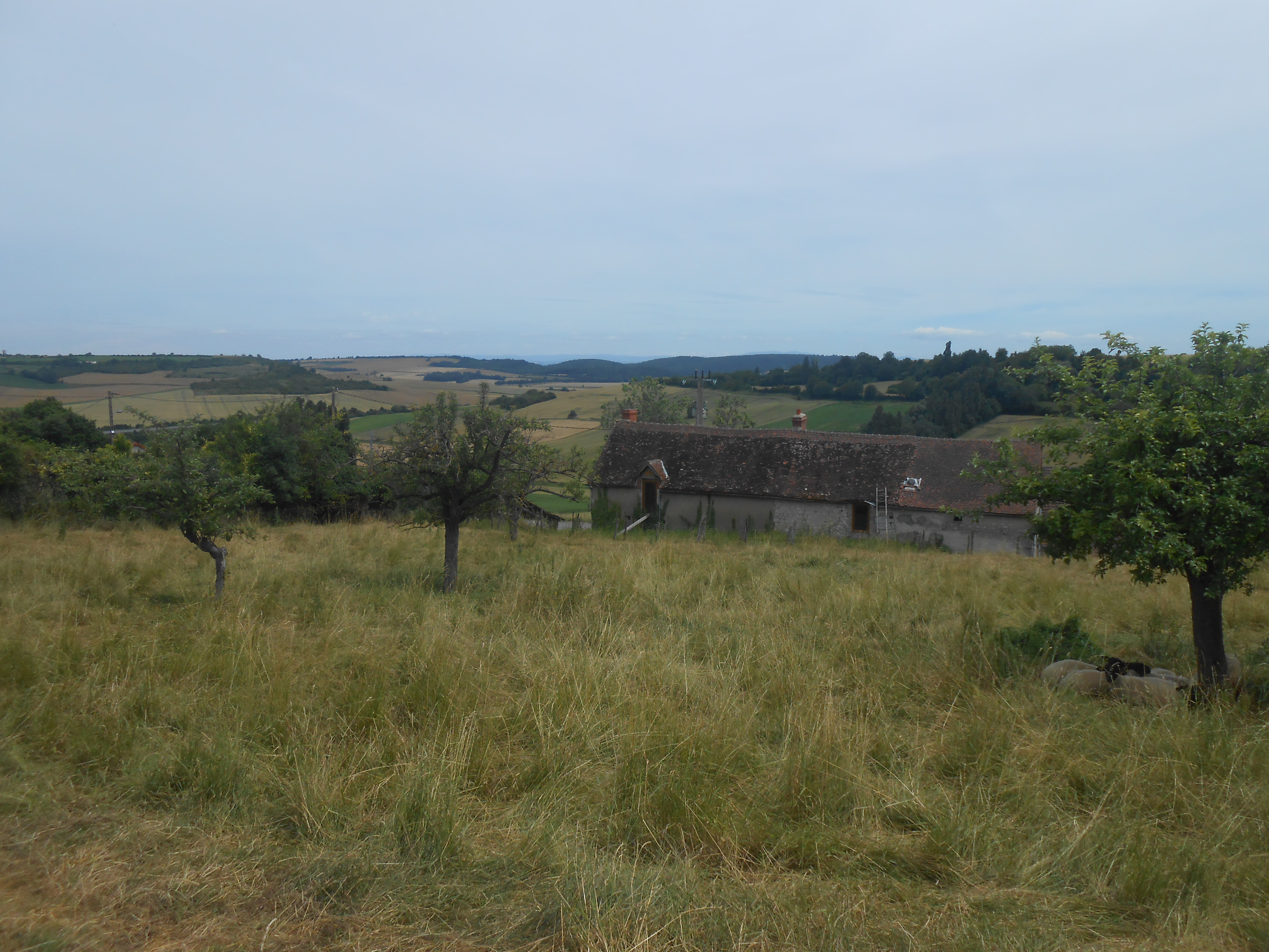 Paysage de Naves en Juin.